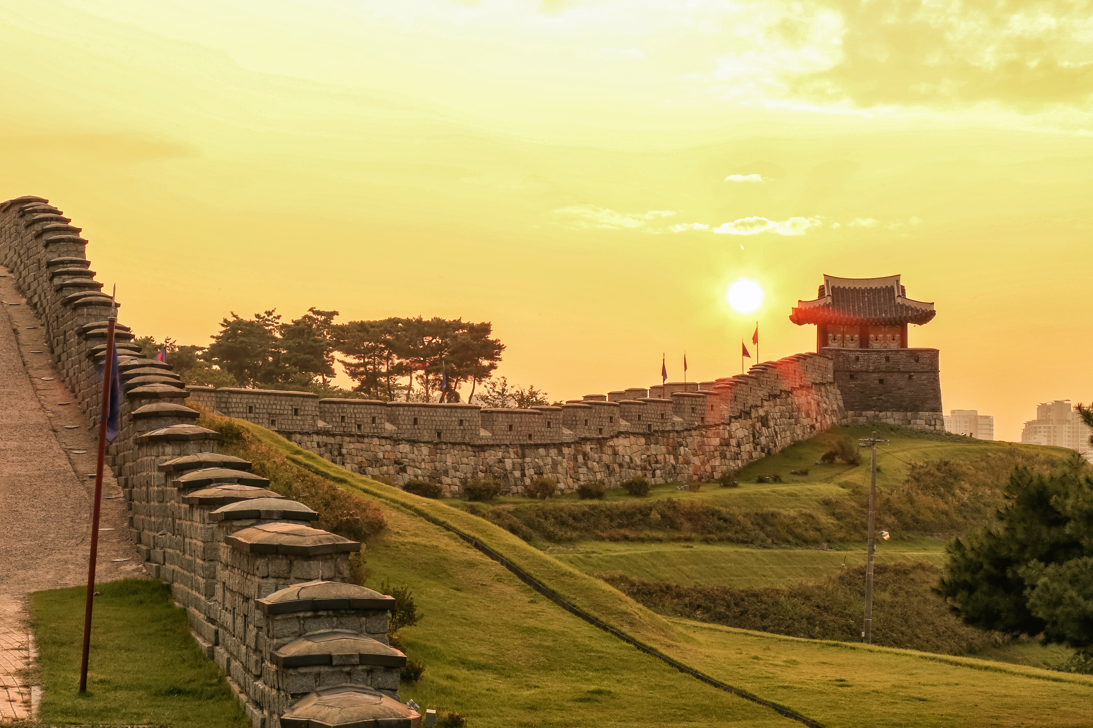 화성, 화성 행궁